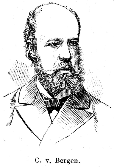 Carl von Bergen